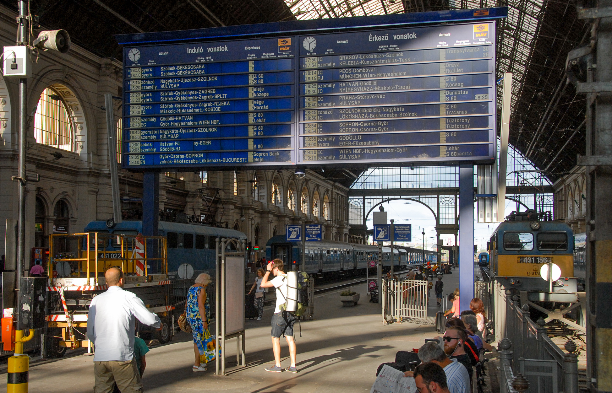 Bahnhof Keleti mit Anzeigetafel im Sommer 2016